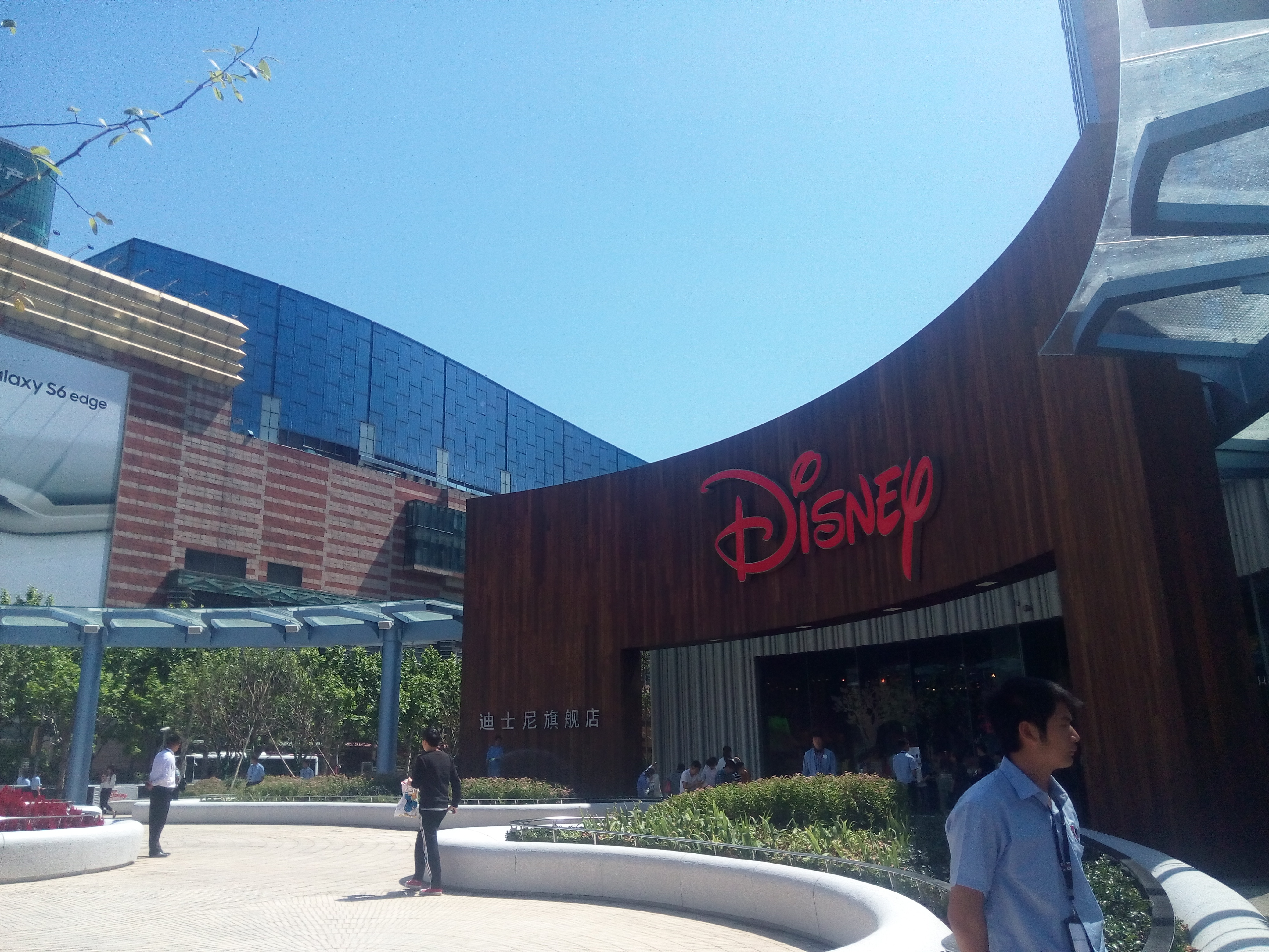 迪士尼旗舰店